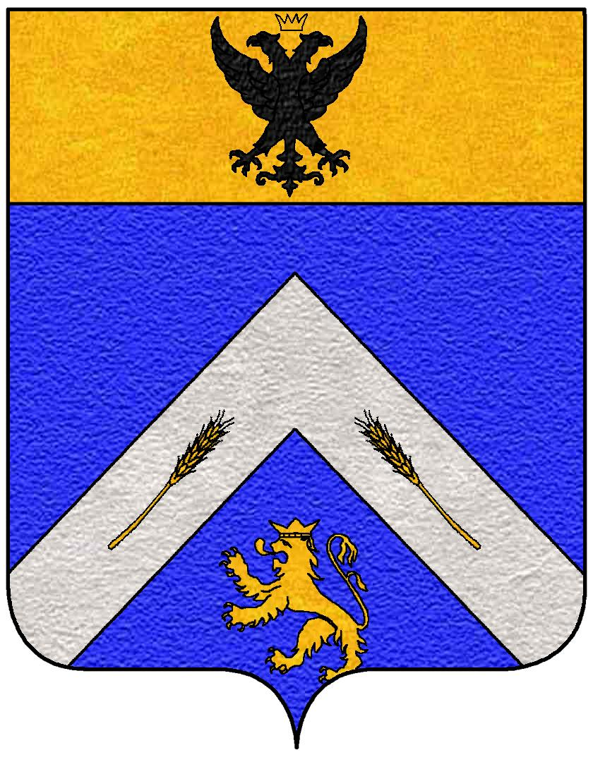 Stemma della famiglia Carandini